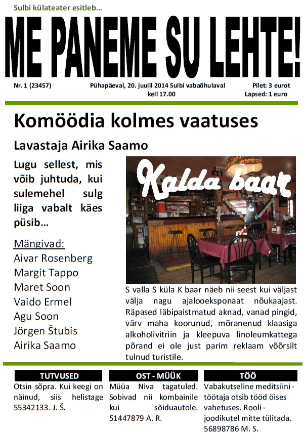 Etenduse plakati idee on pärit kohalike maakonnalehtede kujundustest